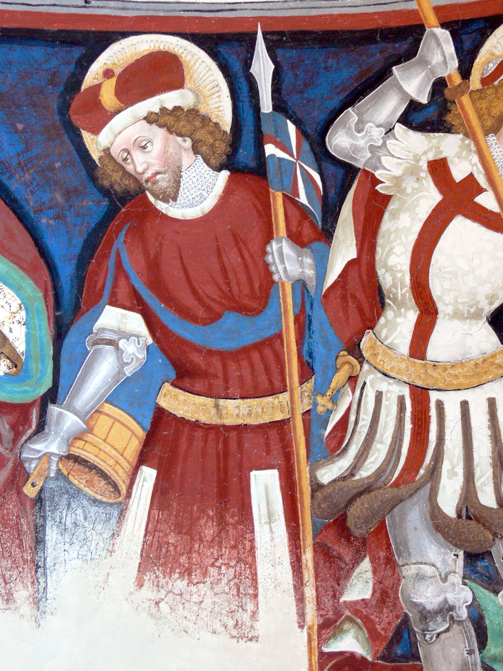 St.Georg in Taisten. Fresco des Leonhard von Brixen ( 1459 ): St.Florian